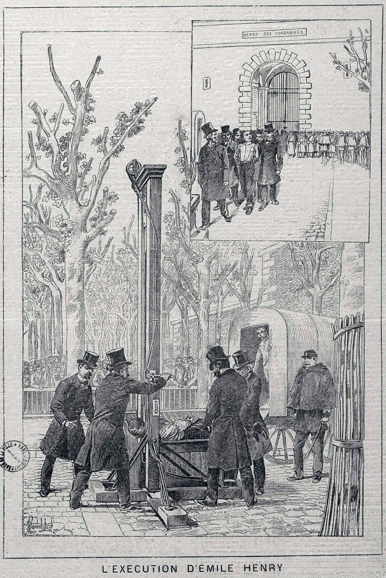 L'Exécution d'Emile Henry. Illustration parue dans Le Progrès illustré, n° 181, 3 juin 1894, p. 8